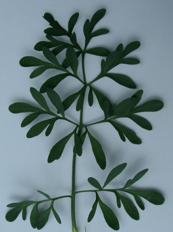 Rue des jardins (feuille), photo J.F. Gaffard, Bucey-lès-Gy, juin 2004